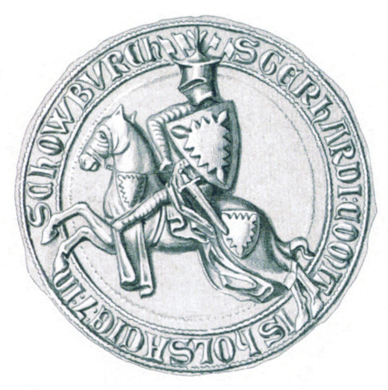 Siegel des Gerhard II. (der Blinde) (Holstein-Plön) aus der Zeit von 1274-1311